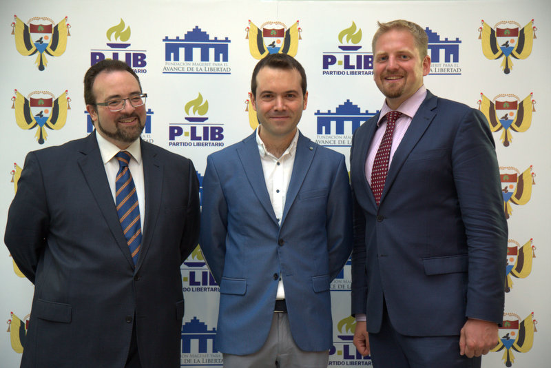 El economista Juan Ramón Rallo con el presidente de Liberland